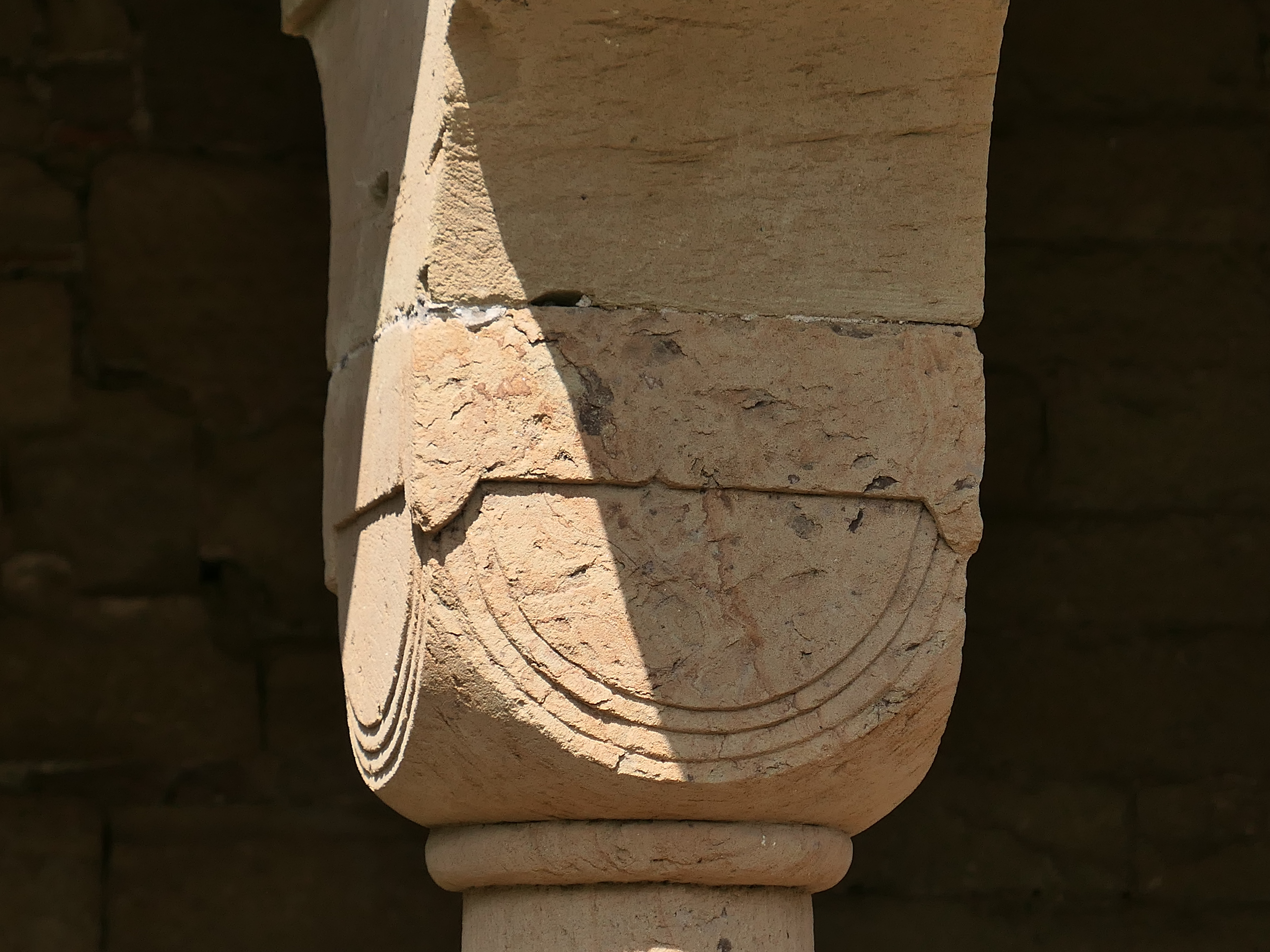 Cloister of Maulbronn Monastery capital